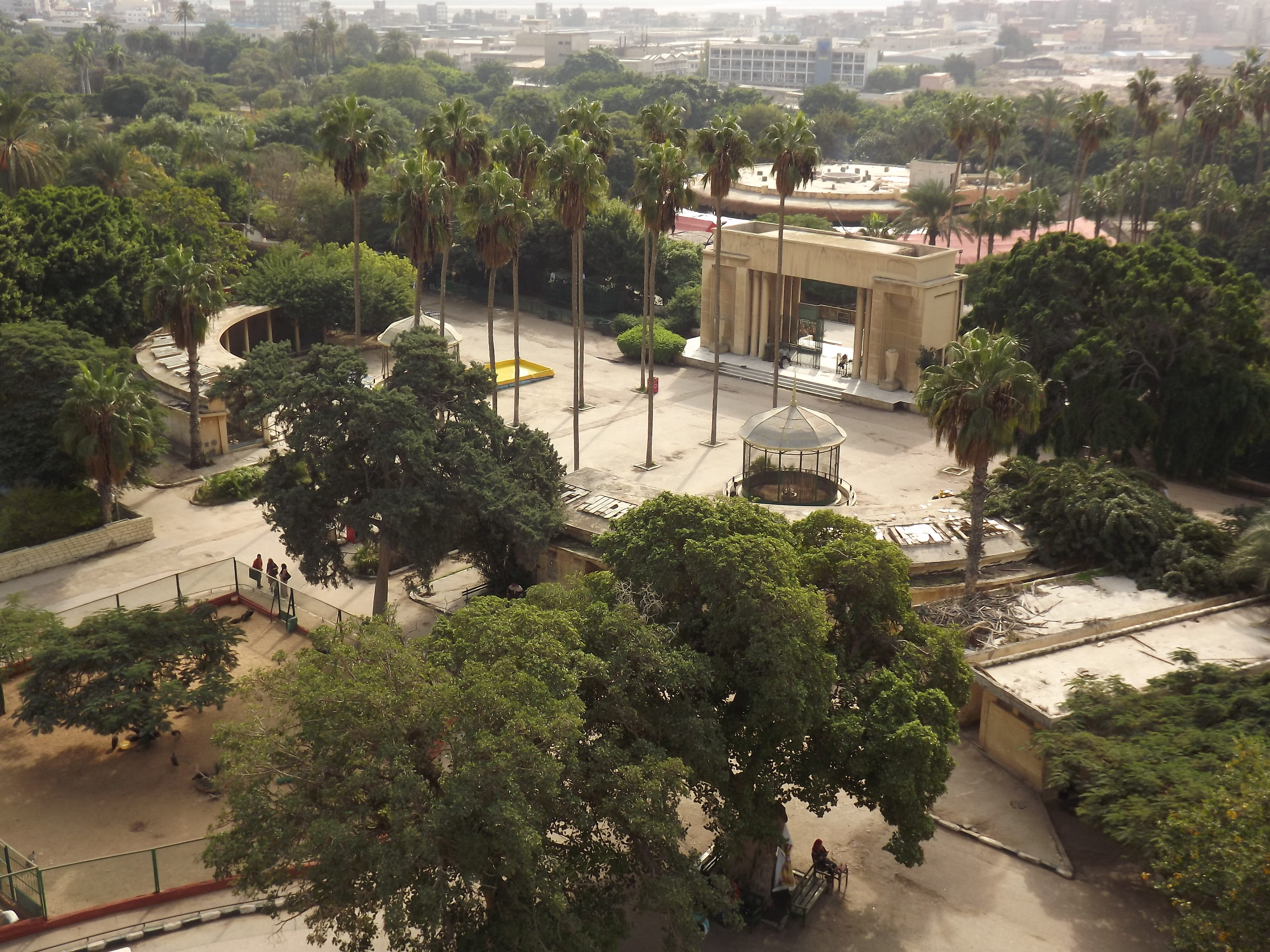 حديقة حيوان النزهة - الاسكندرية